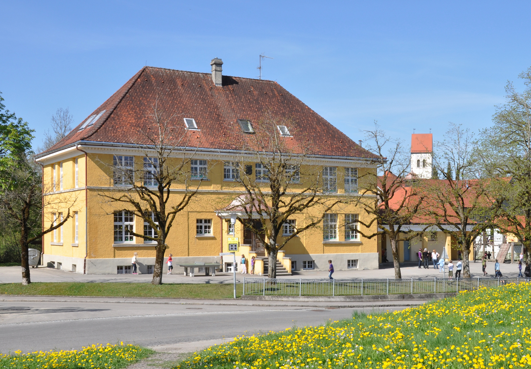 Grundschule Eglofs, Rektorat Eglofs-Eisenharz